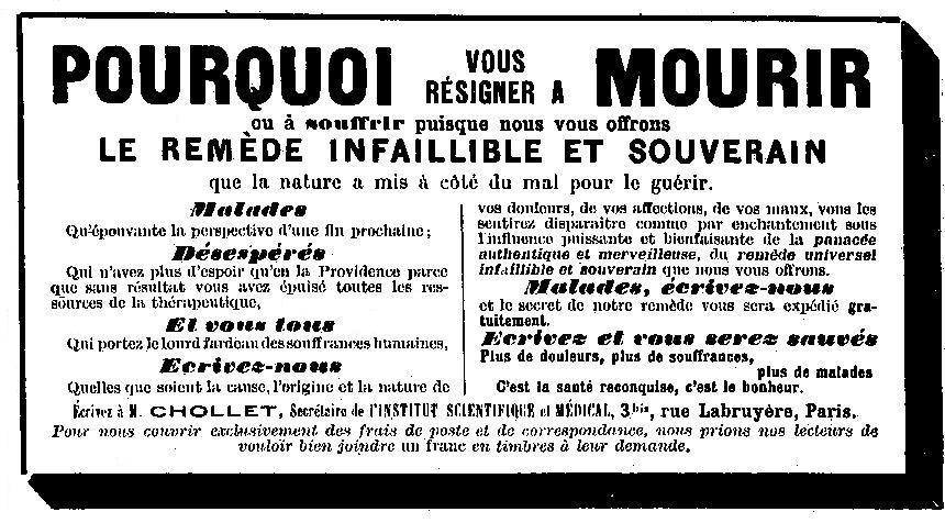 Publicité 1903 provenant de la page